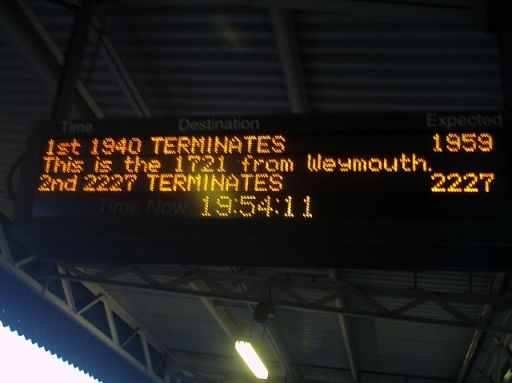 Bristol Temple Mead. "This is" in train announcments